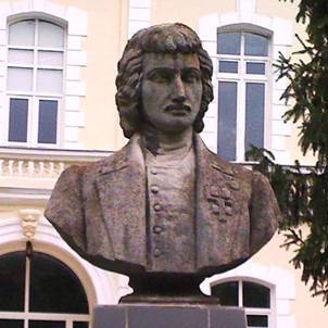 Η προτομή του Κωνσταντίνου Καρακάση εμπρός από την κύρια είσοδο του νοσοκομείου που ίδρυσε ο ίδιος και το οποίο μέχρι σήμερα ονομάζεται “FILANTROPIA